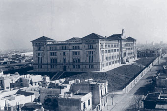 Vista del edificio del Instituto Félix Bernasconi en Buenos Aires, hacia 1930.